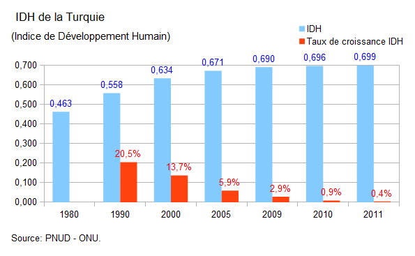 IDH de la Turquie - source: PNUD-ONU